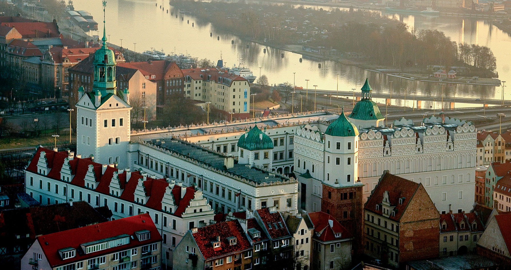 Widok na Zamek z wieży katedry św. Jakuba